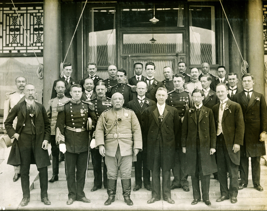 袁世凱於1913年10月10日正式就任中華民國大總統之後，各國駐中使節覲見合影。